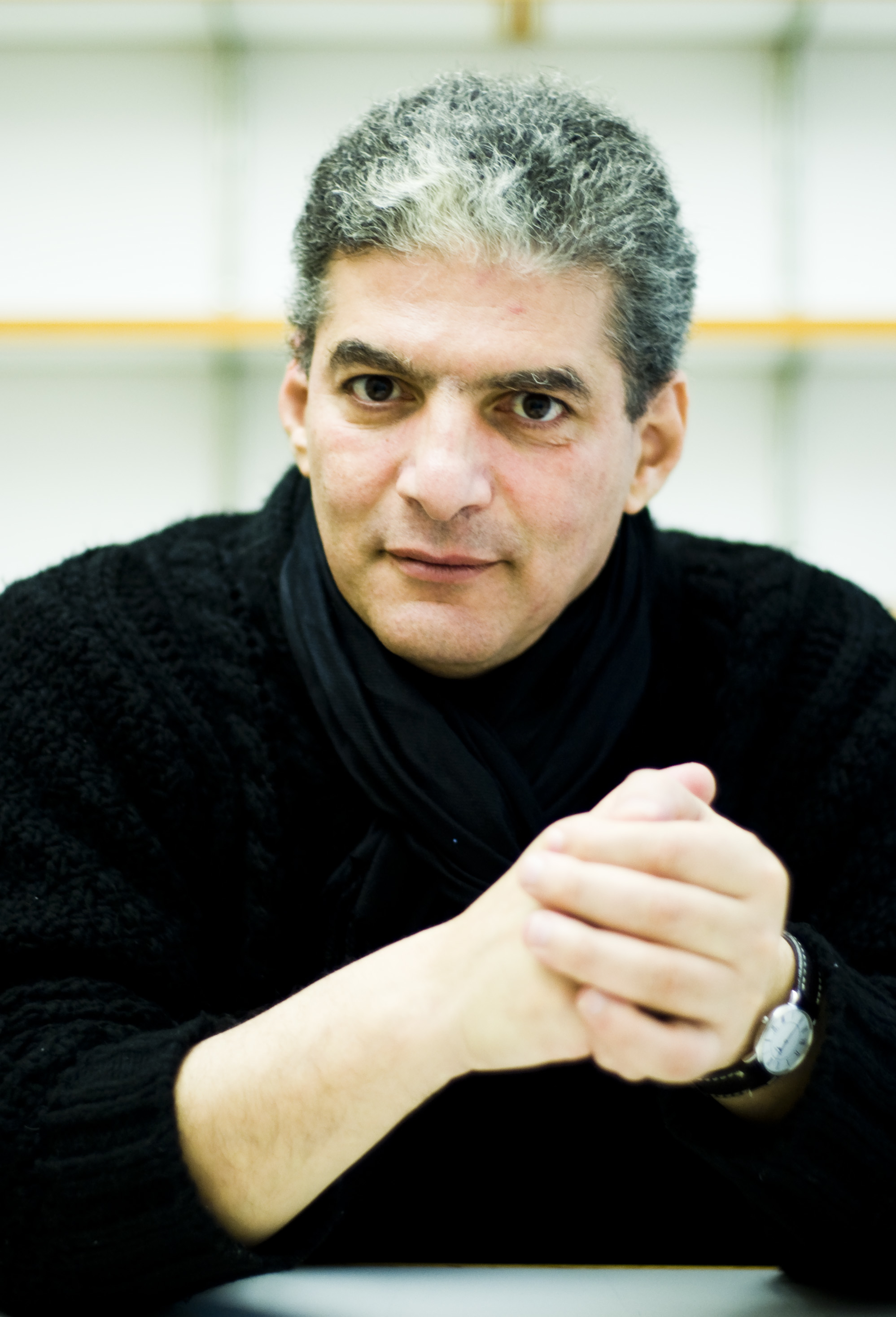 portrait de l’auteur